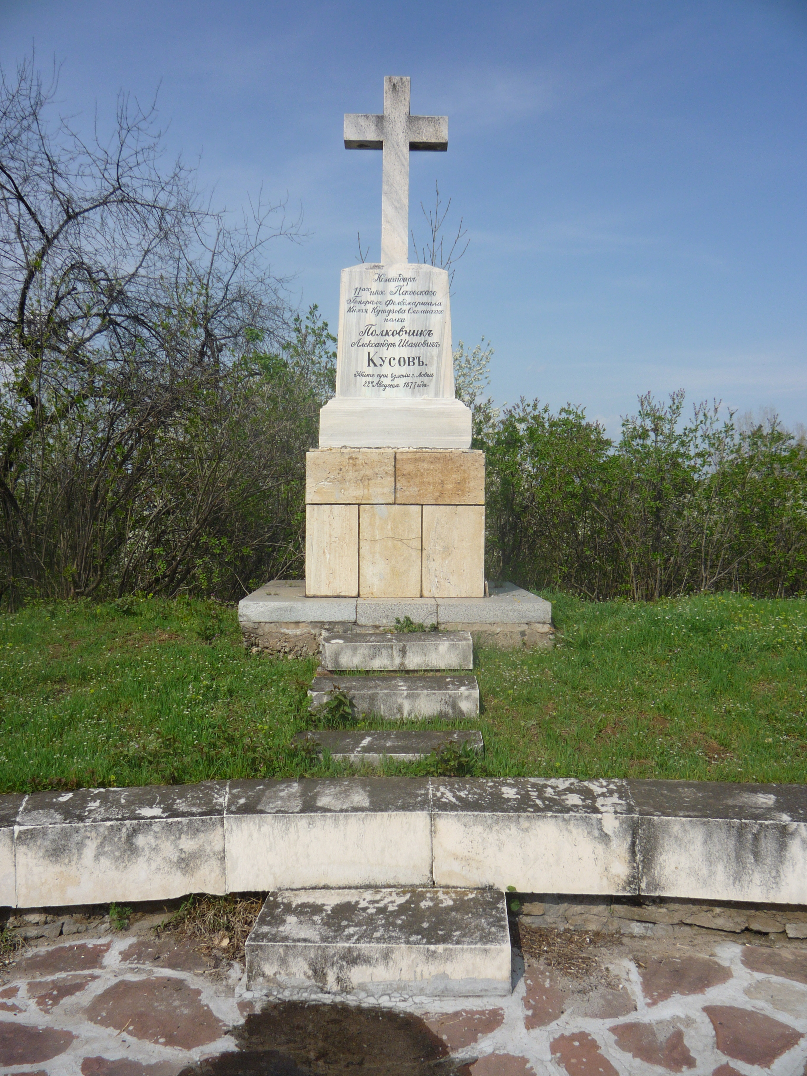 Надгробен паметник на полковник Александър Иванович Кусов, командир на 11-ти пехотен Псковски полк. Загинал на 22 август 1877г., при освобождението на Ловеч в Руско-турската война 1877-1878г. Алея на Българо-руската дружба, хълма "Стратеш", град Ловеч.